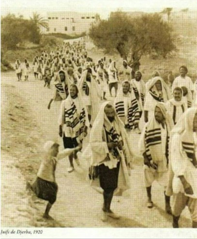 יהודי הקהילה בצאתם מבית הכנסת בבוקר שבת, צולם על ידי גוי